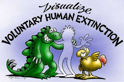 התנועה להכחדות מרצון של האנושות אישור שימוש ביצירה זו נמצא בתחתית דף זה באתר של התנועה: Except where noted, works on this site are licensed under a Creative Commons Attribution 3.0 United States License. org